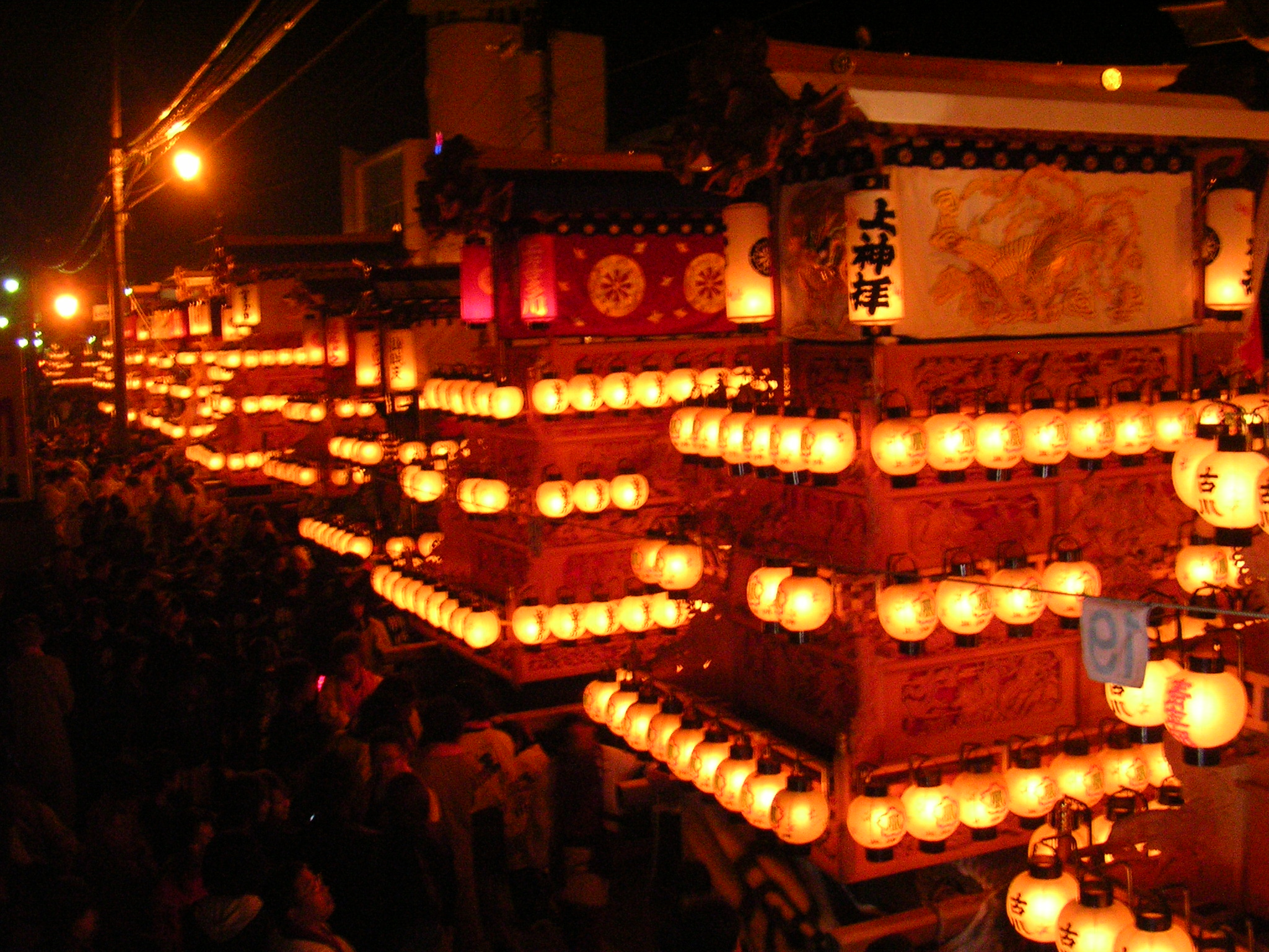 愛媛県西条市で10月中旬に行われる秋祭り。奉納屋台数70台以上と全国最大の規模を誇る伊曽乃神社祭礼をはじめとする市内の代表的な4つの神社の例祭の総称として「西条祭り」とよぶ。詳細についてはリンク「西条祭り」の記事を参照。